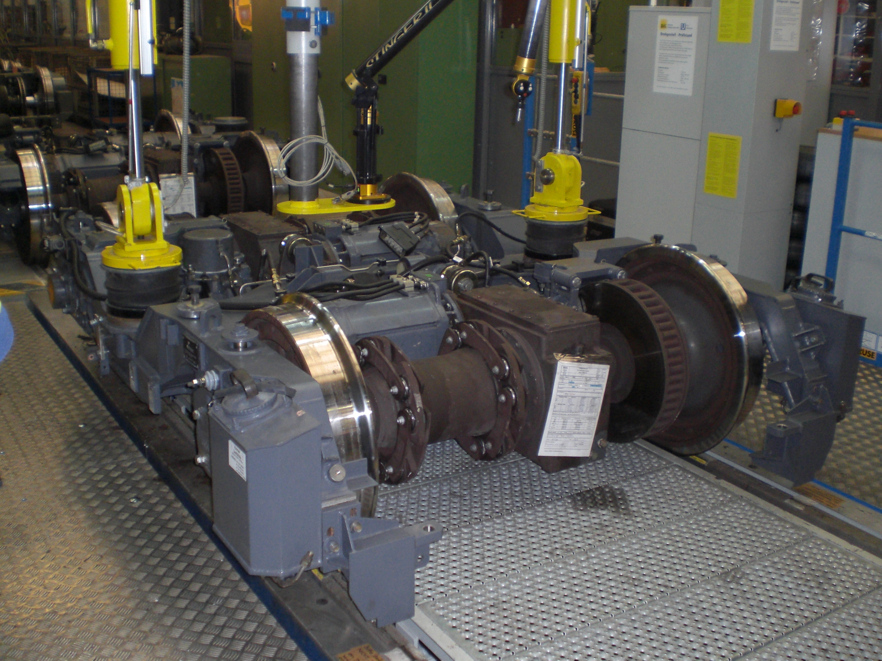 U-Bahn Hauptwerkstatt Müllerstraße